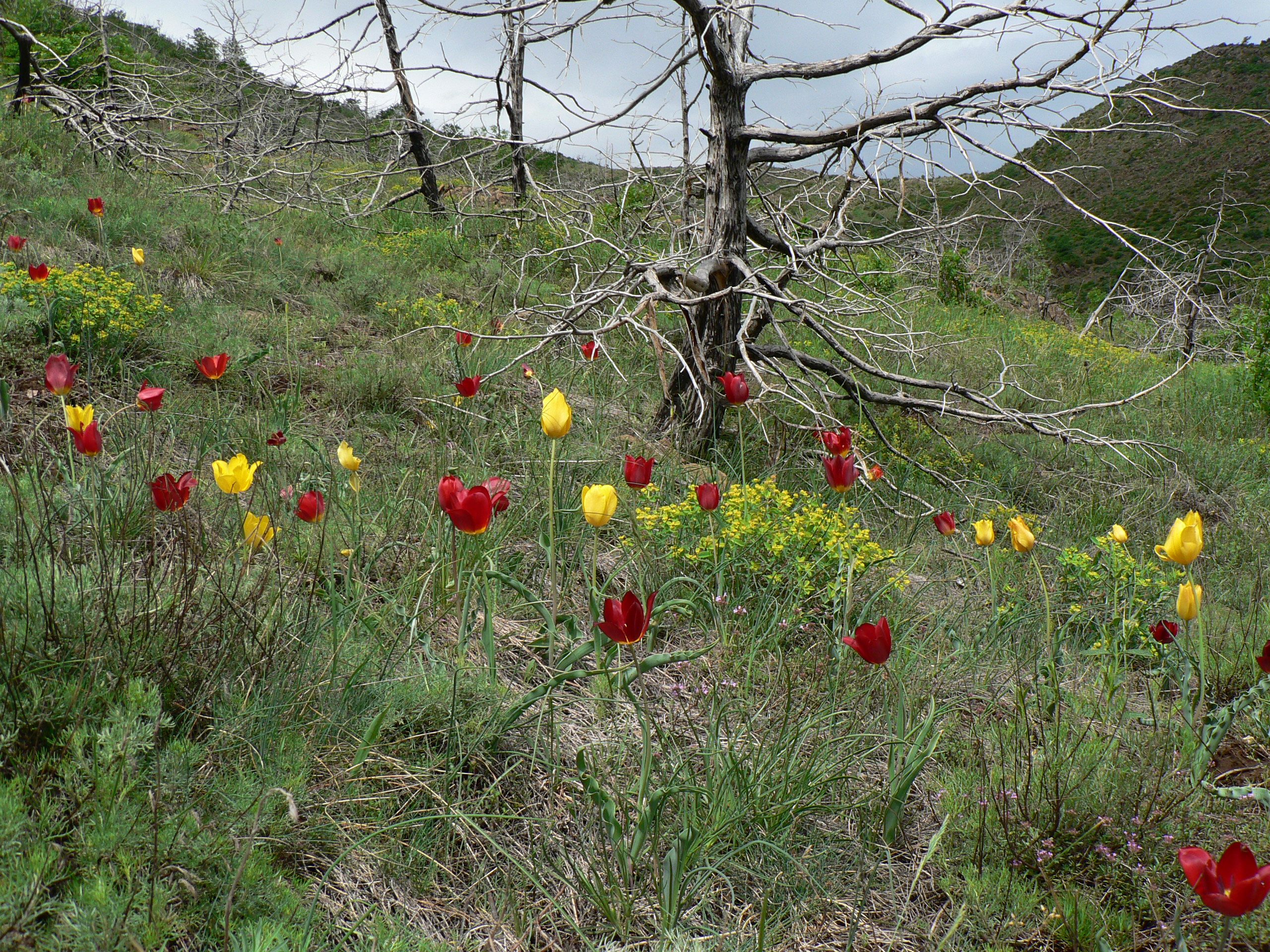 Lëndina e Tulipanëve ndodhet ndërmjet zonës së Kolshit dhe Surroit Kukës Albania. Është vendi i Tulipanit Shqiptar (Tulipa albanica), bimë endemike e shqipërisë.